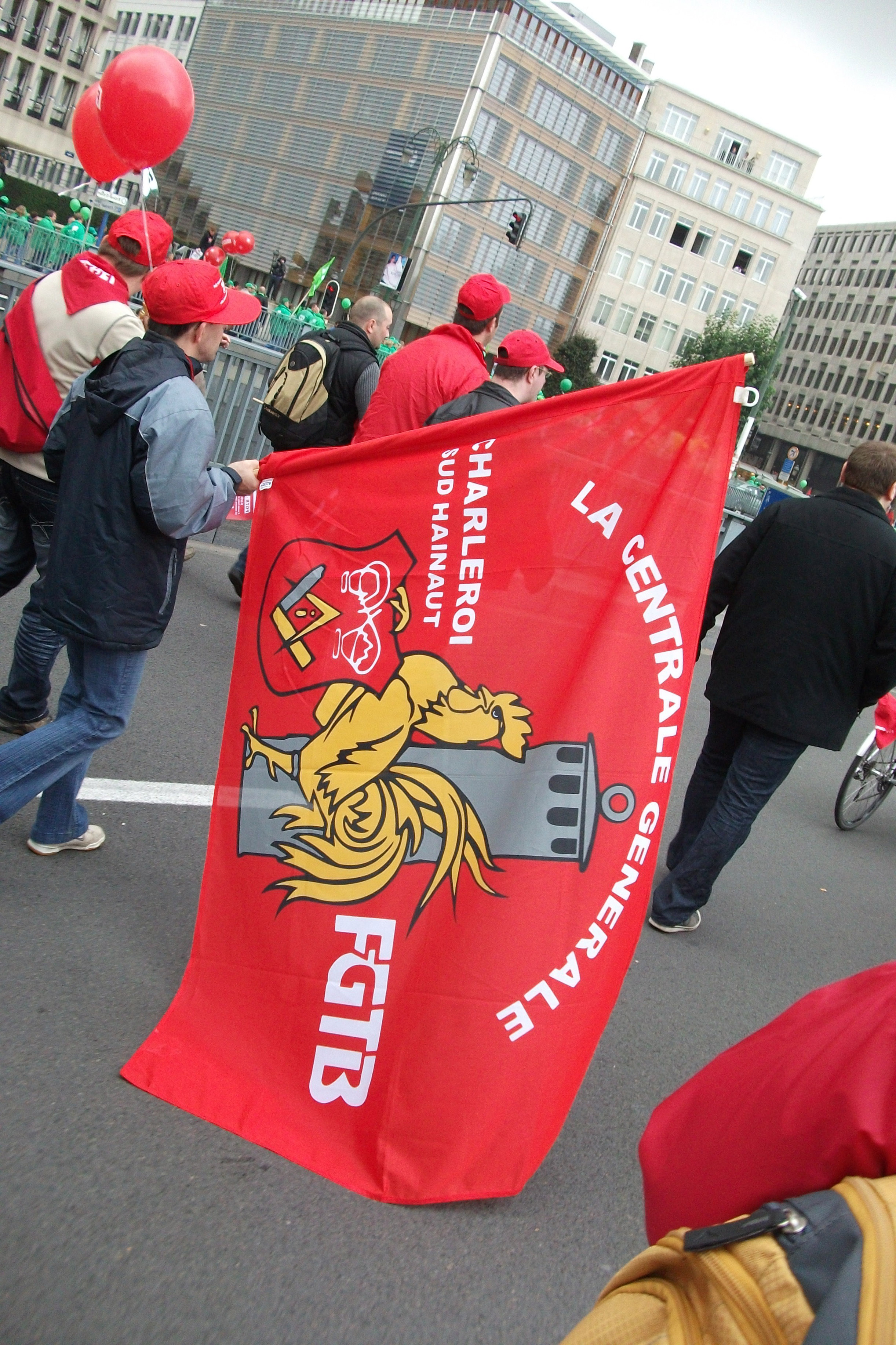 Manifestation de Bruxelles 2010 contre les politiques d'austérité, le FGTB.